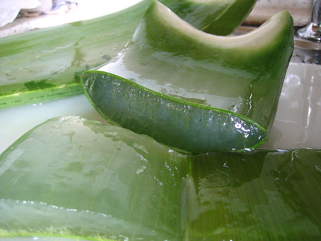 കറ്റാർ‌വാഴയുടെ ഇലകളിൽ അടങ്ങിയിരിക്കുന്ന ജലാംശം